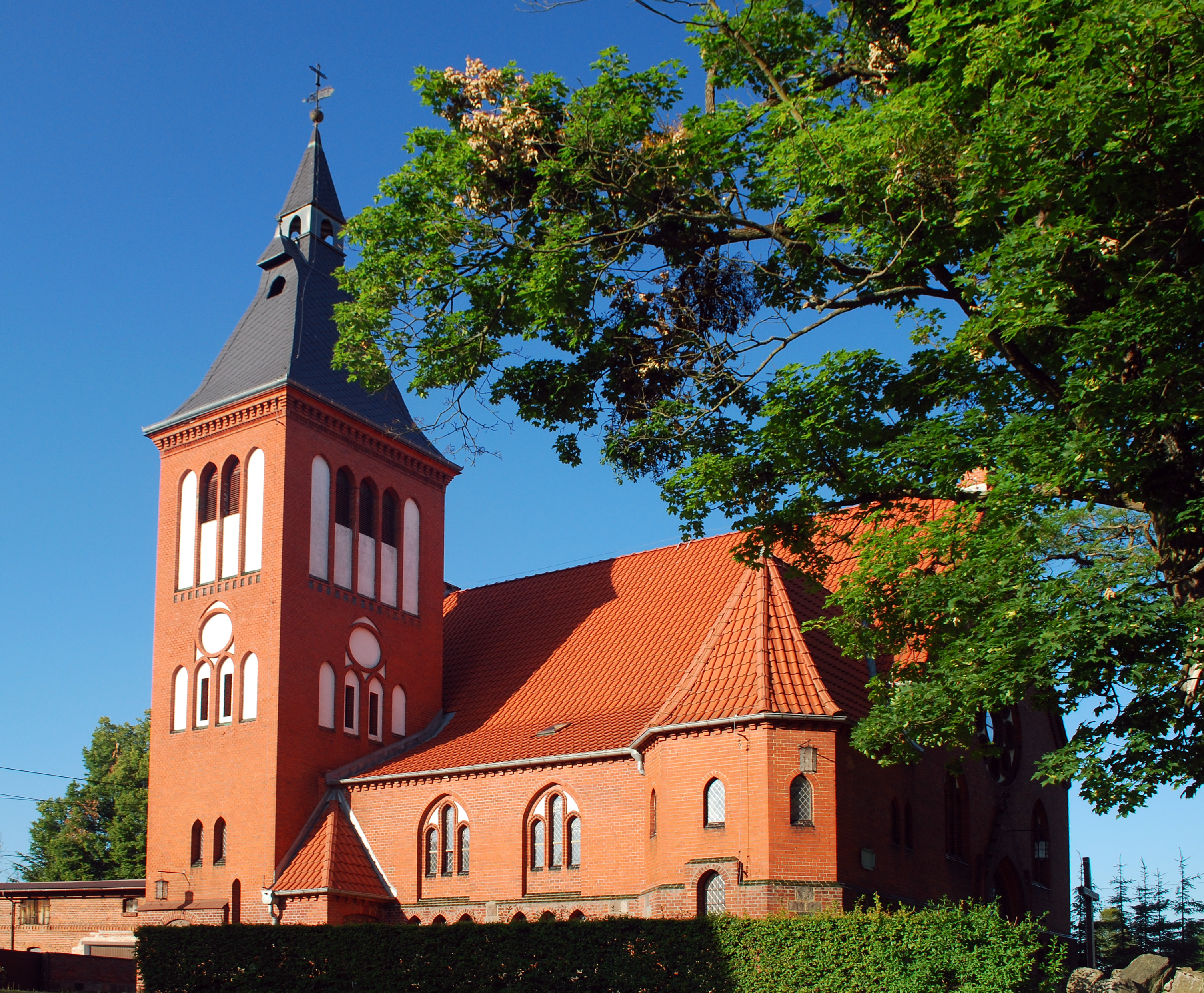 Kościół w Swarożynie.